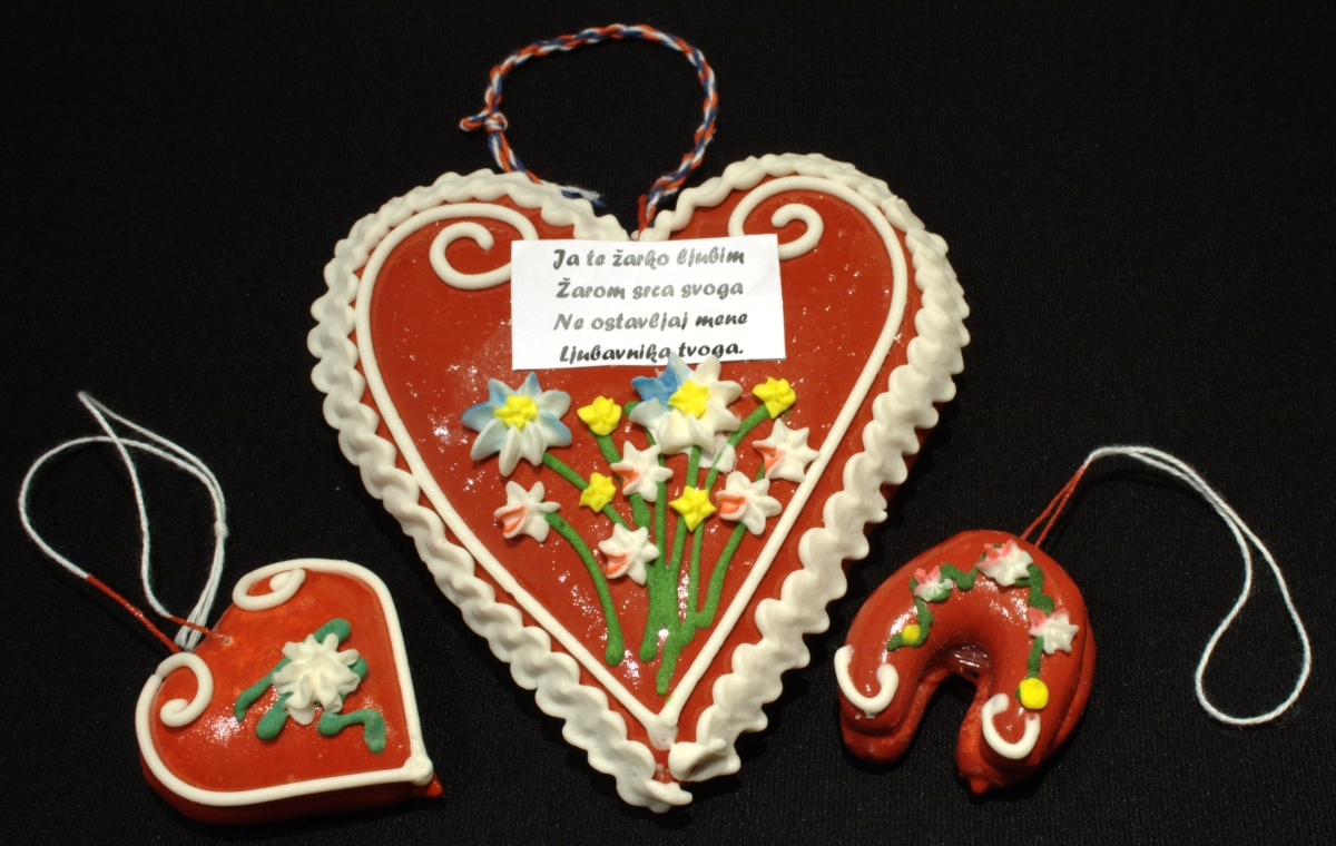 Licitarska srca